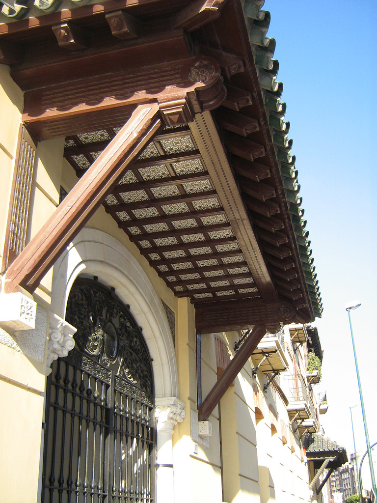 Casas de Félix Sáenz